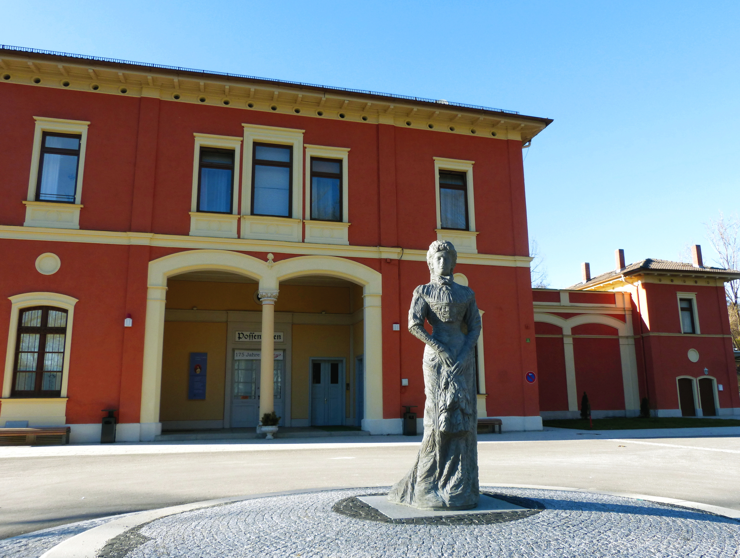 Pöcking, OT Possenhofen, Kaiserin-Elisabeth-Museum im ehemaligen Empfangsgebäude des Bahnhofs Possenhofen. Die Bronzestatue der Kaiserin auf dem Vorplatz des Gebäudes ist ein Werk des Pöckinger Bildhauers Jozek Nowak.